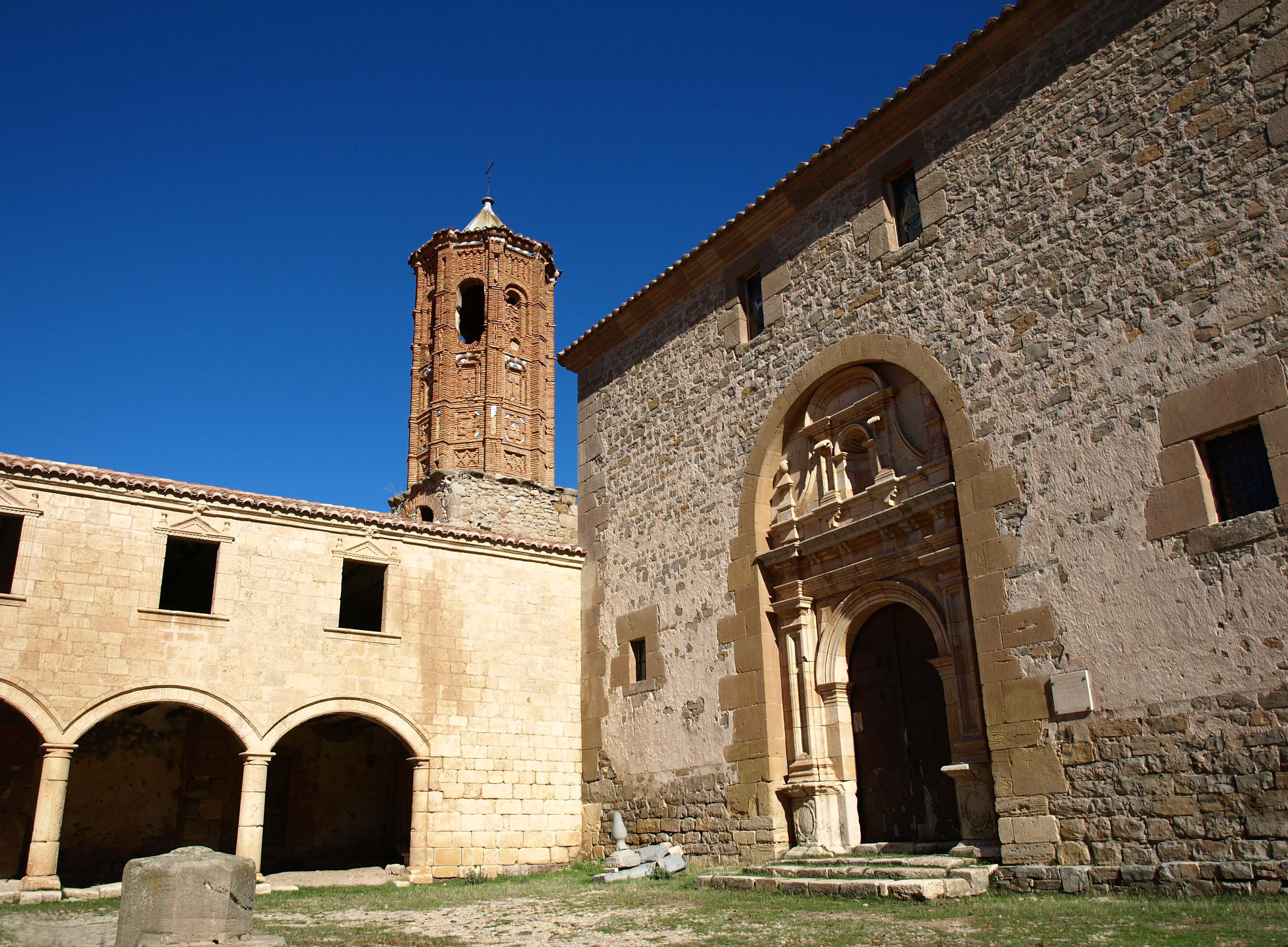 El Santuario de la Virgen del Campo en Camarillas es un conjunto arquitectónico en el que se concentran, en torno a un patio abierto de planta rectangular, la ermita vieja, la ermita nueva y varias construcciones secundarias. La ermita vieja data del siglo XIV, es de estilo gótico y se abre al patio a través de un pórtico renacentista de dos pisos construido totalmente en piedra sillar, adosado al muro sur de la ermita. La ermita, que presenta fábrica de cantería, es de traza muy sencilla, con ábside poligonal y nave única cubierta con bóvedas de crucería. La cabecera al interior se encuentra separada de la nave por un tabique y al exterior tiene adosada una torre mudéjar de ladrillo, levantada ya en el siglo XVI. La ermita nueva es un edificio del siglo XVIII, de mayor tamaño que el anterior y también construido en mampostería y sillar. Consta de tres naves de cuatro tramos, un crucero cubierto con cúpula y una cabecera recta. Al exterior destaca su fachada clasicista y al interior varias pinturas murales de estilo barroco. Entre las construcciones secundarias de carácter popular sobresale la denominada "Casa del Ermitaño" del siglo XVI. Esta foto participa en el juego En un lugar de flickr Se trata de adivinar el lugar de la fotografia. No contestes si no estás registrado en el juego!!!!. Si deseas contestar, únete primero! Muchas gracias:-)